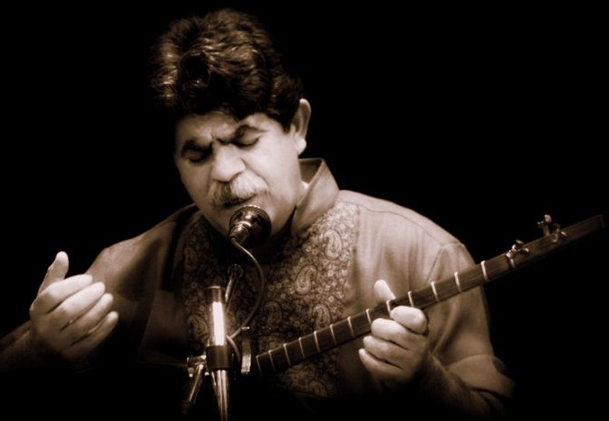 استاد علی اکبر مرادی